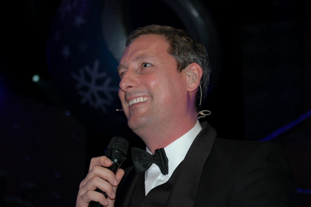 Gert Verhulst (Berchem, 24 januari 1968) is een Vlaams acteur, scenarioschrijver, filmregisseur, televisiepresentator en ondernemer. Het bekendst is hij vanwege zijn rol als Gert in het televisieprogramma Samson en Gert. Hij staat aan het hoofd van het productiebedrijf Studio 100. -- Gert Verhulst neemt tekeningen aan van kinderen op het podium van de negentiende Samson en Gert kerstshow in de Koningin Elisabethzaal te Antwerpen.